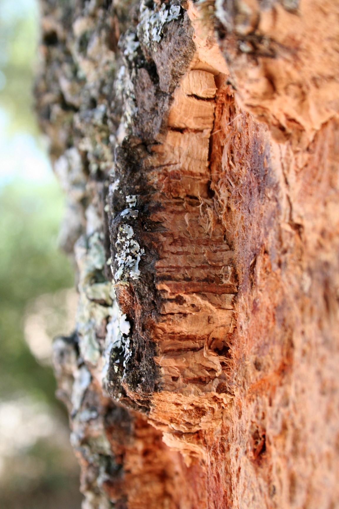 Korkeiche (Quercus suber), aufgenommen in der Nähe von Arraiolos, Portugal.